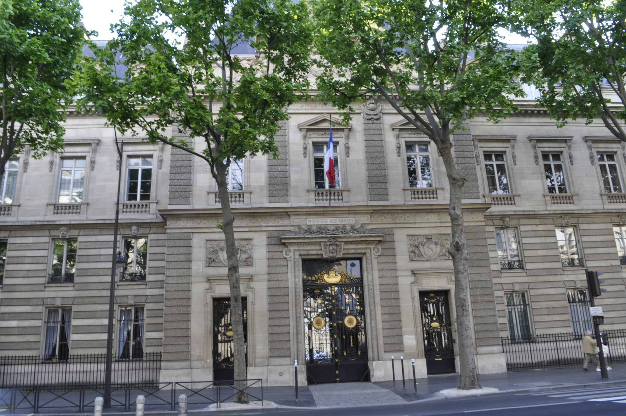 231, boulevard Saint-Germain, Paris 7e siège de l'État-major des armées, de l'État-major de l'armée de terre ...